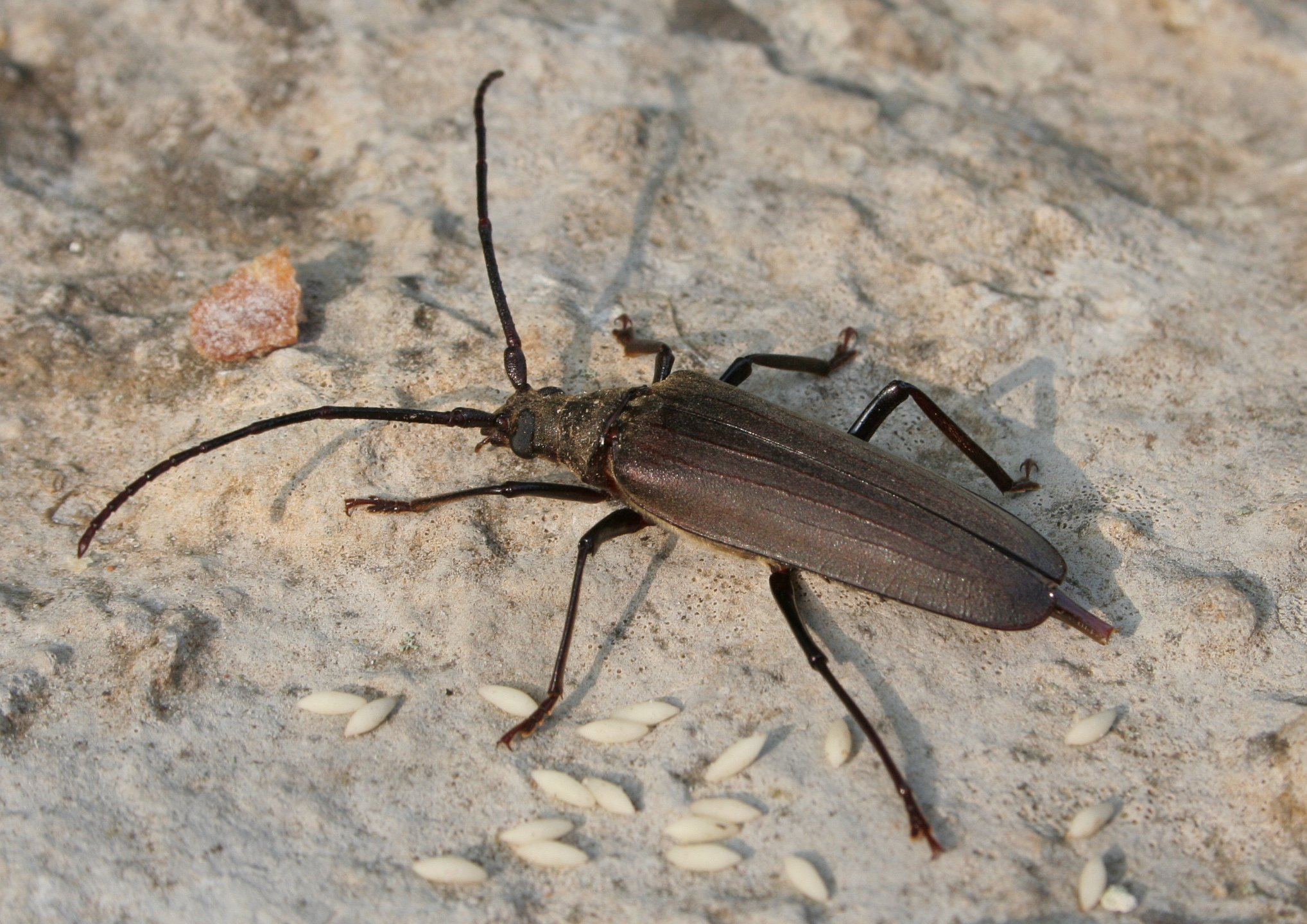 Aegosoma scabricorne, female and eggs, St Martin Labouval, Lot, France, juillet 2007